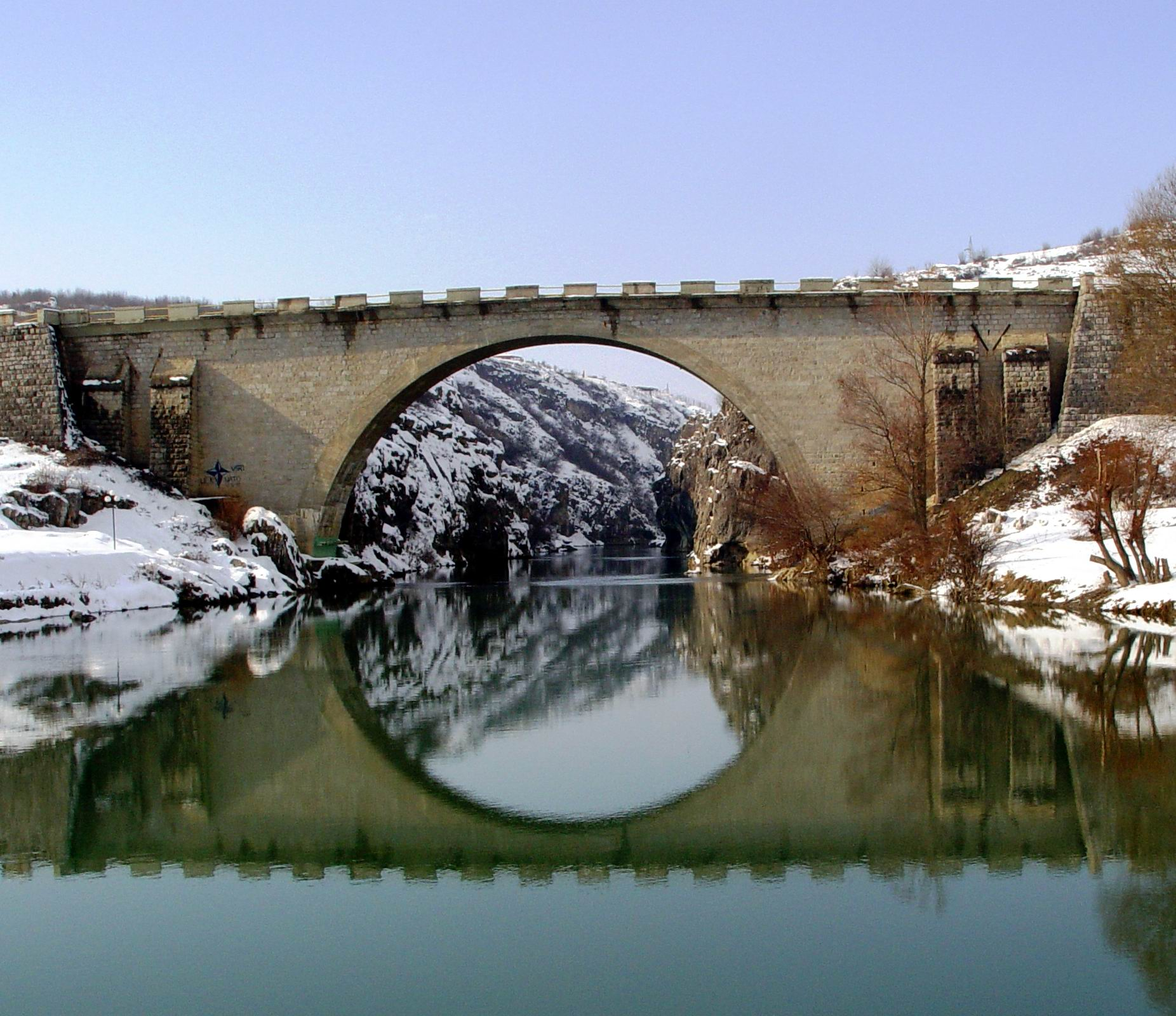 Kanioni i Drinit të Bardhë te Ura e Fshajtë, Gjakovë Rahovec